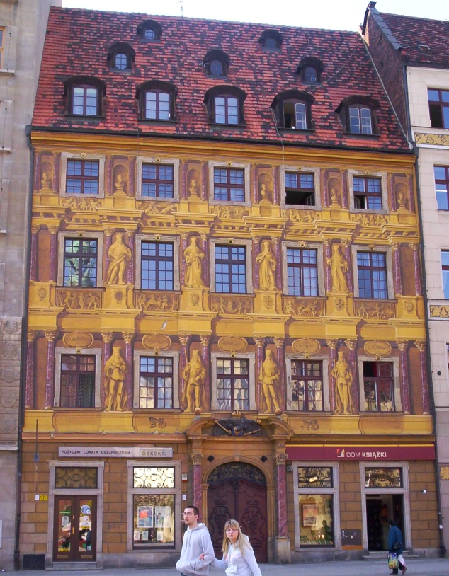 Kamienica Pod Siedmioma Elektorami -Rynek Wrocław